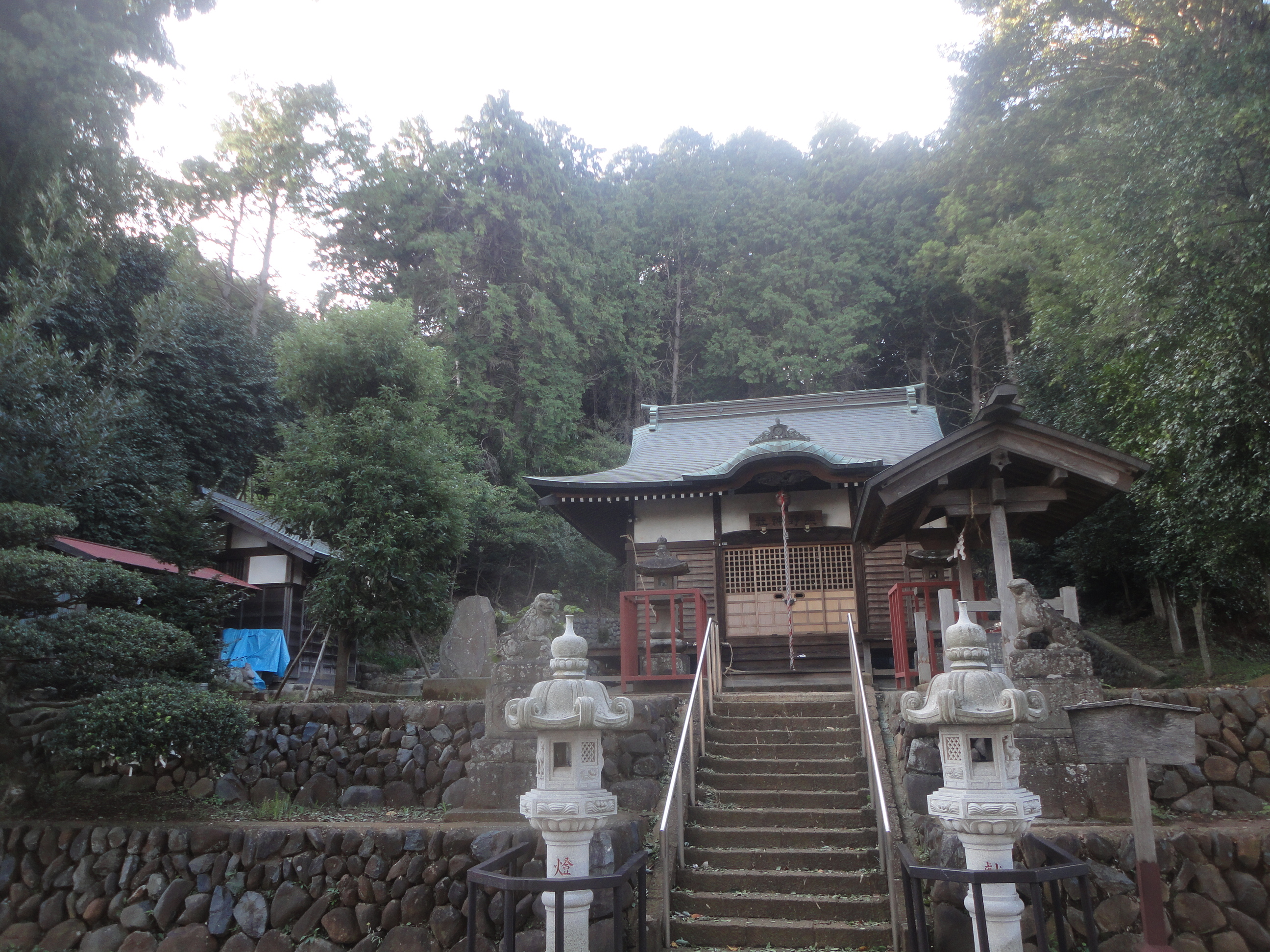 東中野・浅間神社